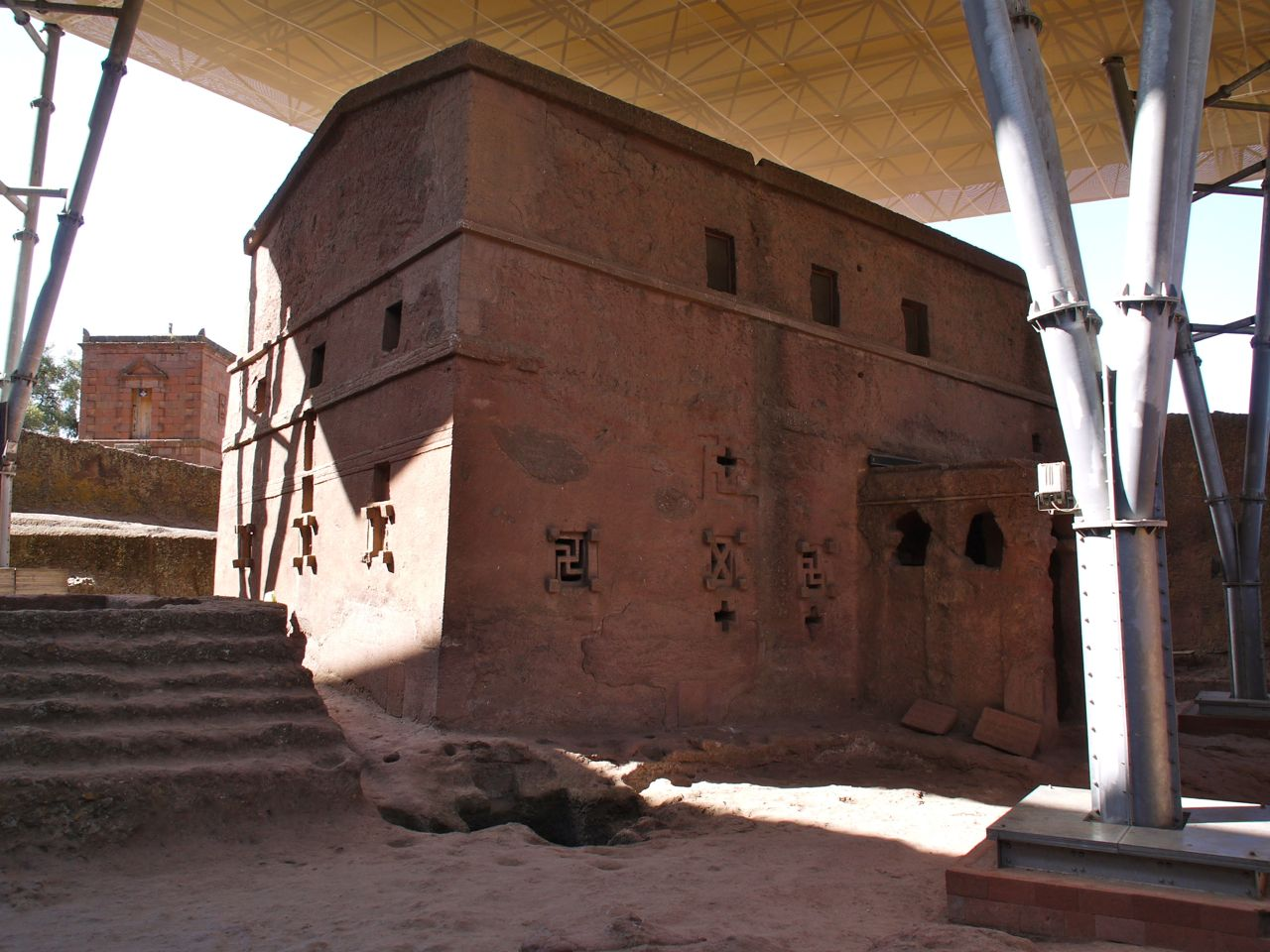 Bete Ghenettea Mariam (Huis van Maria), waarschijnlijk de oudste van alle kerken